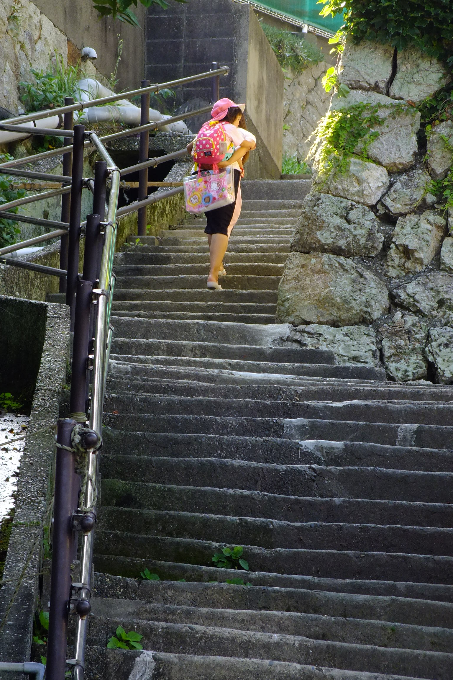 2016-08-05 Kami Island (Mie) 神島民家・路地